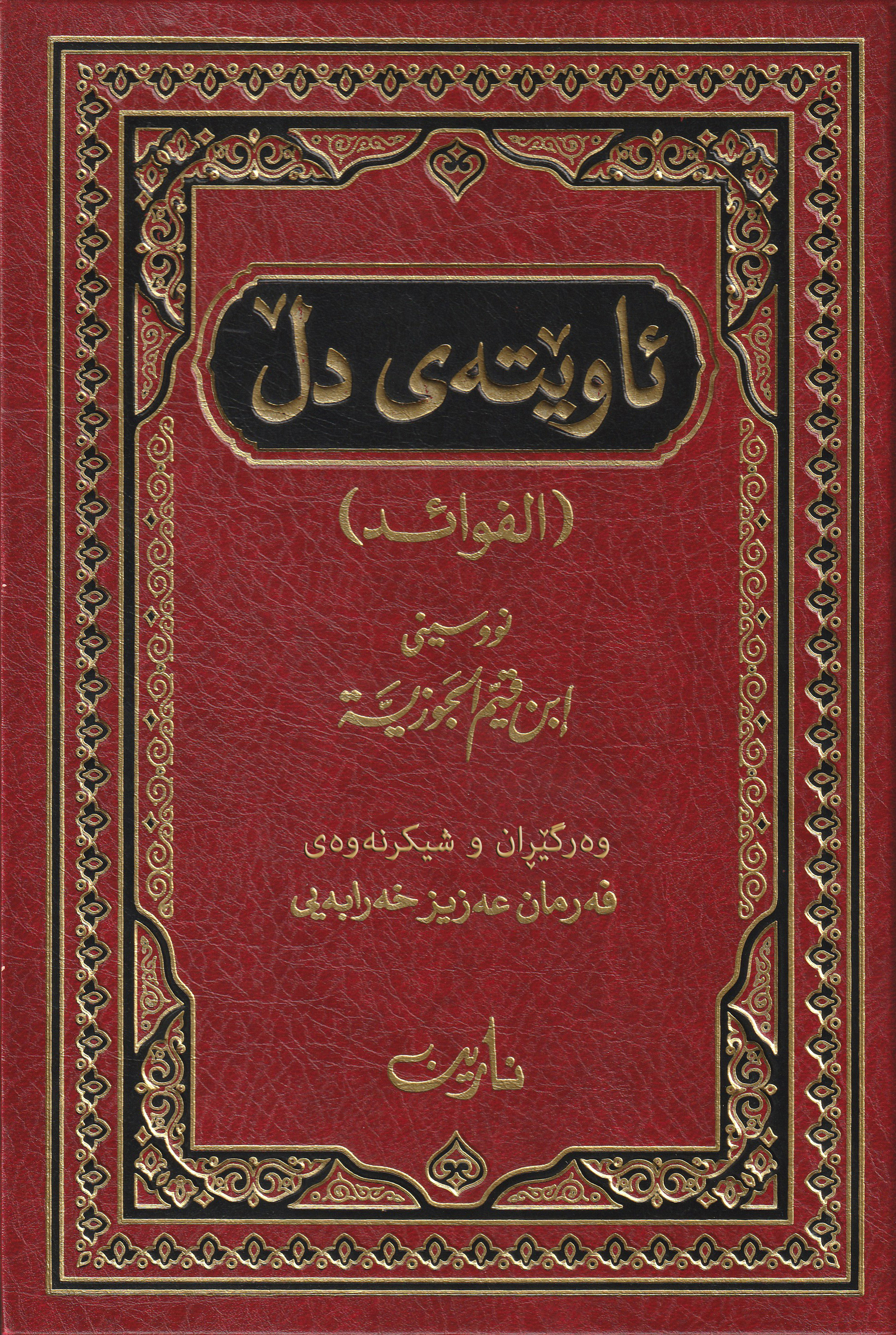 کوردی: ئاوێتەی دڵ